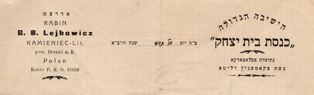 כותרת נייר מכתבים של ישיבת "כנסת בית יצחק" בקמניץ